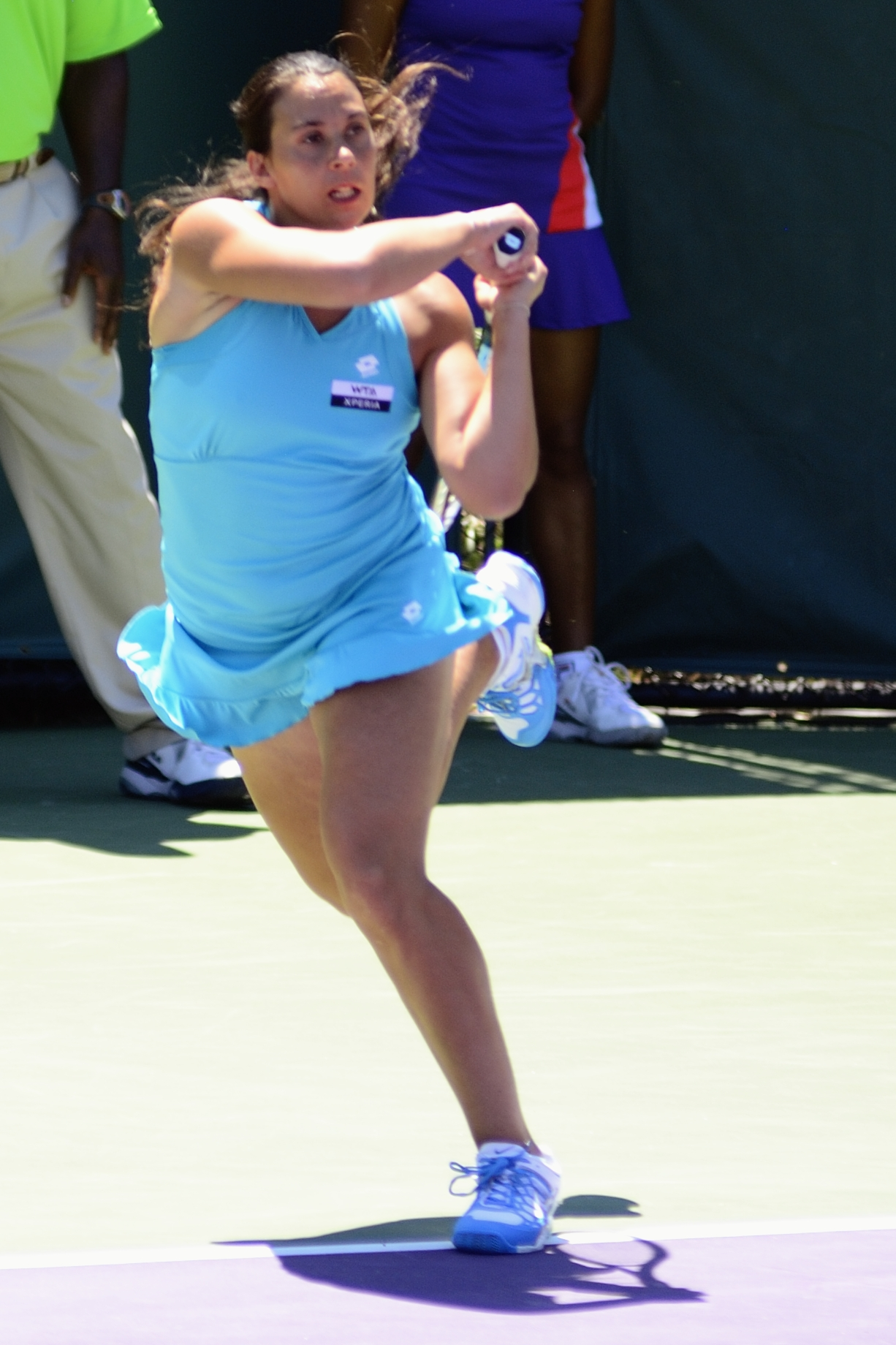 Emiliàn e rumagnòl: La Marion Bartoli tòlta śò durànt al Sony Eriksson Open, Miami, dal 2012